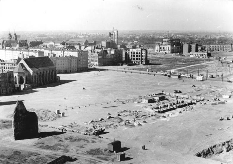 Zentralbild-Biscan 17.4.1953 Am 1. Mai Grundsteinlegung Beginn des Nationalen Aufbauwerks in Magdeburg Der Architekturbeirat der Regierung der Deutschen Demokratischen Republik hat den für den Bau des Zentralen Platzes und der Ost-West-Strasse in Magdeburg vorgelegten Plänen grundsätzlich zugestimmt und damit den Weg zum Beginn des Nationalen Aufbauwerkes in Magdeburg freigegeben. Der Rat der Stadt hat nun beschlossen, die Grundsteinlegung am 1. Mai vorzunehmen.- In diesen Tagen zeigt sich auf der zukünftigen Grossbaustelle bereits ein reges Leben. Die Vorbereitungen für den Beginn der Bauarbeiten sind in vollem Gange. UBz: Neben dem ältesten Teil Magdeburgs entsteht der jüngste. Blick auf die südliche Hälfte des Zentralen Platzes, wo für die 300 Arbeiter der Baustelle ein Kulturraum, Waschräume und Verkaufsstellen der HO und des Konsums errichtet werden. Der steil in den Himmel ragende Ruinenrest in der linken unteren Ecke des Bildes ist ein Rest der frühesten Stadtbefestigung Magdeburgs und steht unter Denkmalschutz. Dieser Teil der Stadtbefestigung ist im 13. Jahrhundert in einen Wohnturm umgebaut worden.